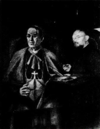 Girolamo Leussink ofwel Dom Jérôme Leussink, geboren Gerhardus Johannes Antonius Leussink (Zwolle, 4 oktober 1898 – Rome, 29 maart 1952), bij zijn portret van kardinaal De Jong (1947).